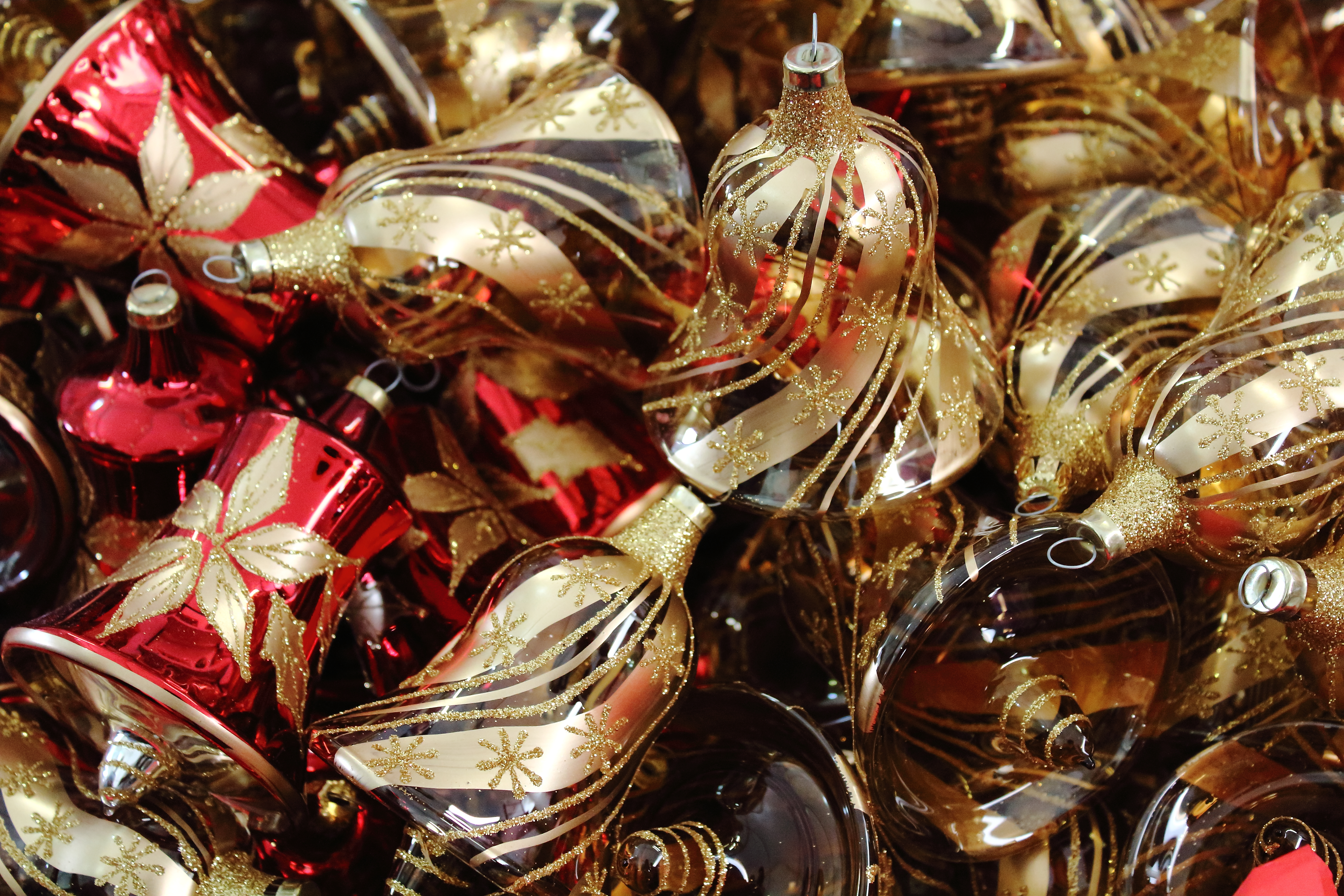 Campanas hechas de vidrio.